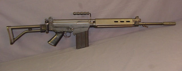 Fuzil FN FAL M964 A1(Para-FAL) - 7,62mm OTAN